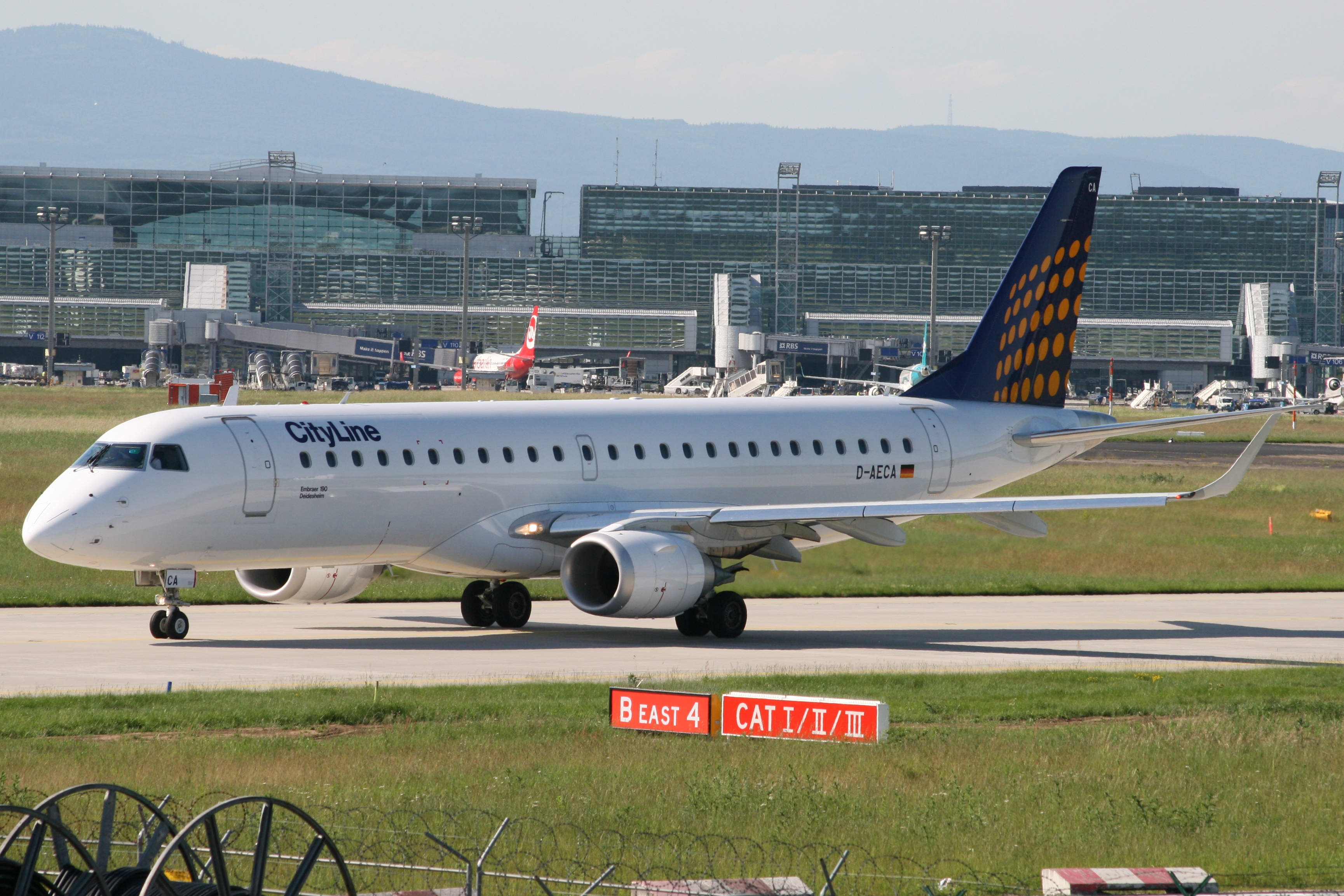 D-AECA, c/n 19000327